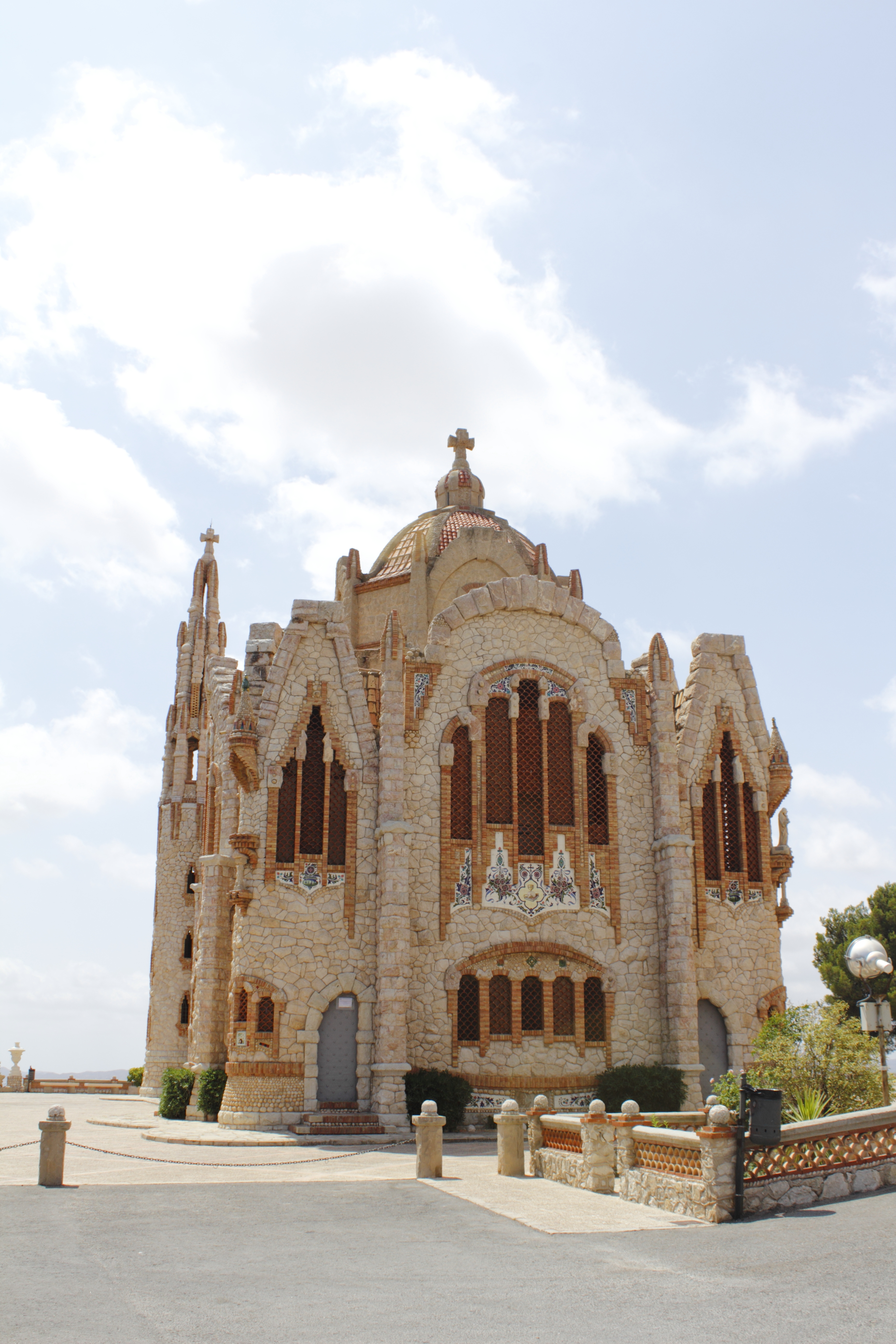 Santuario de Santa Maria Magdalena in Novelda Spanien. Denkmalnummer 03.29.093-007